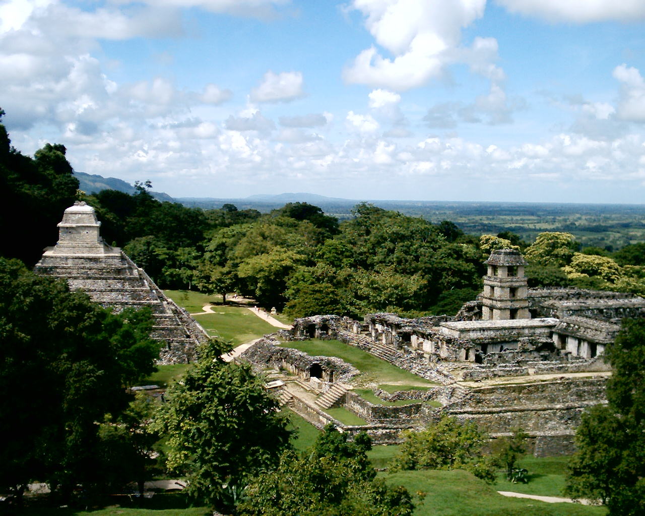 Zona arqueológica de Palenque Chiapas, México